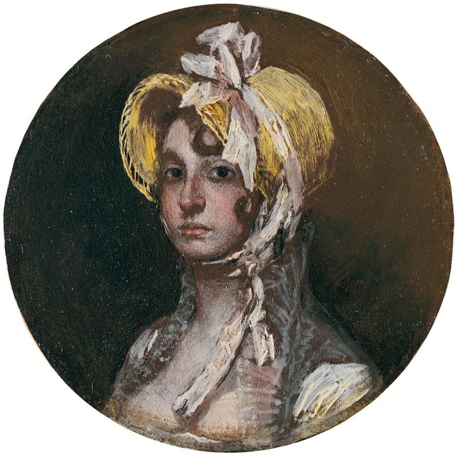 Retrato de Gumersinda Goicoechea y Galarza, esposa de Javier de Goya y nuera del pintor Francisco de Goya.